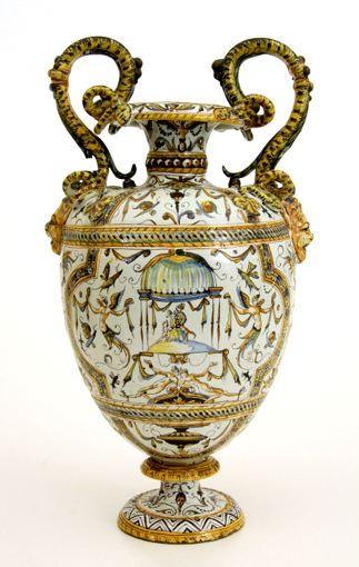 Vaso decorato a raffaellesche. Nicolò Sisti, Pisa. Seconda metà del XVI secolo.